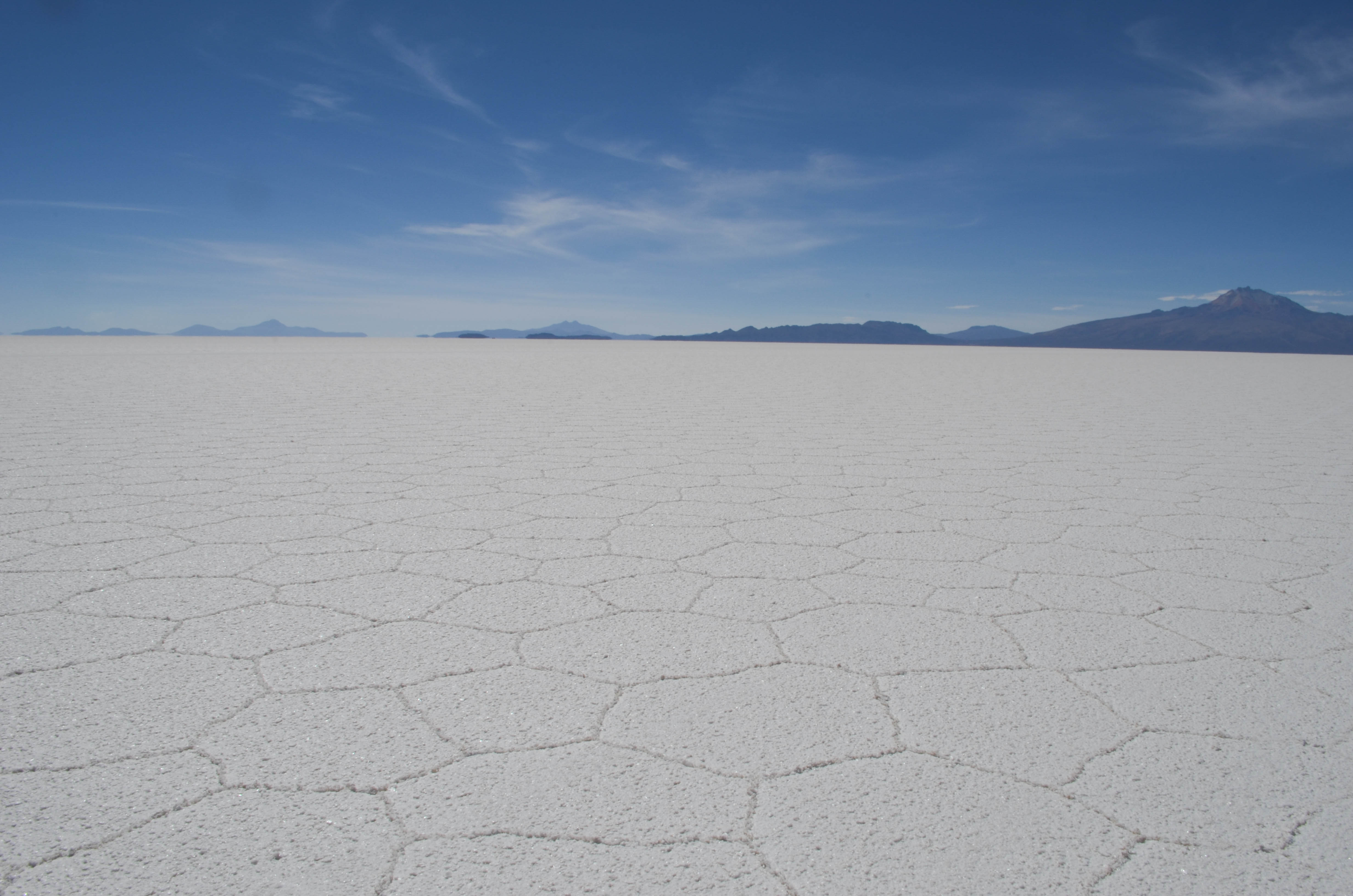 11.7 Salar de Uyuni-50